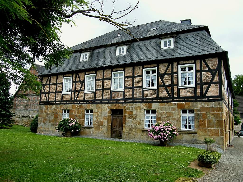 Nordenbeck Alte Burg (Herrenhaus)